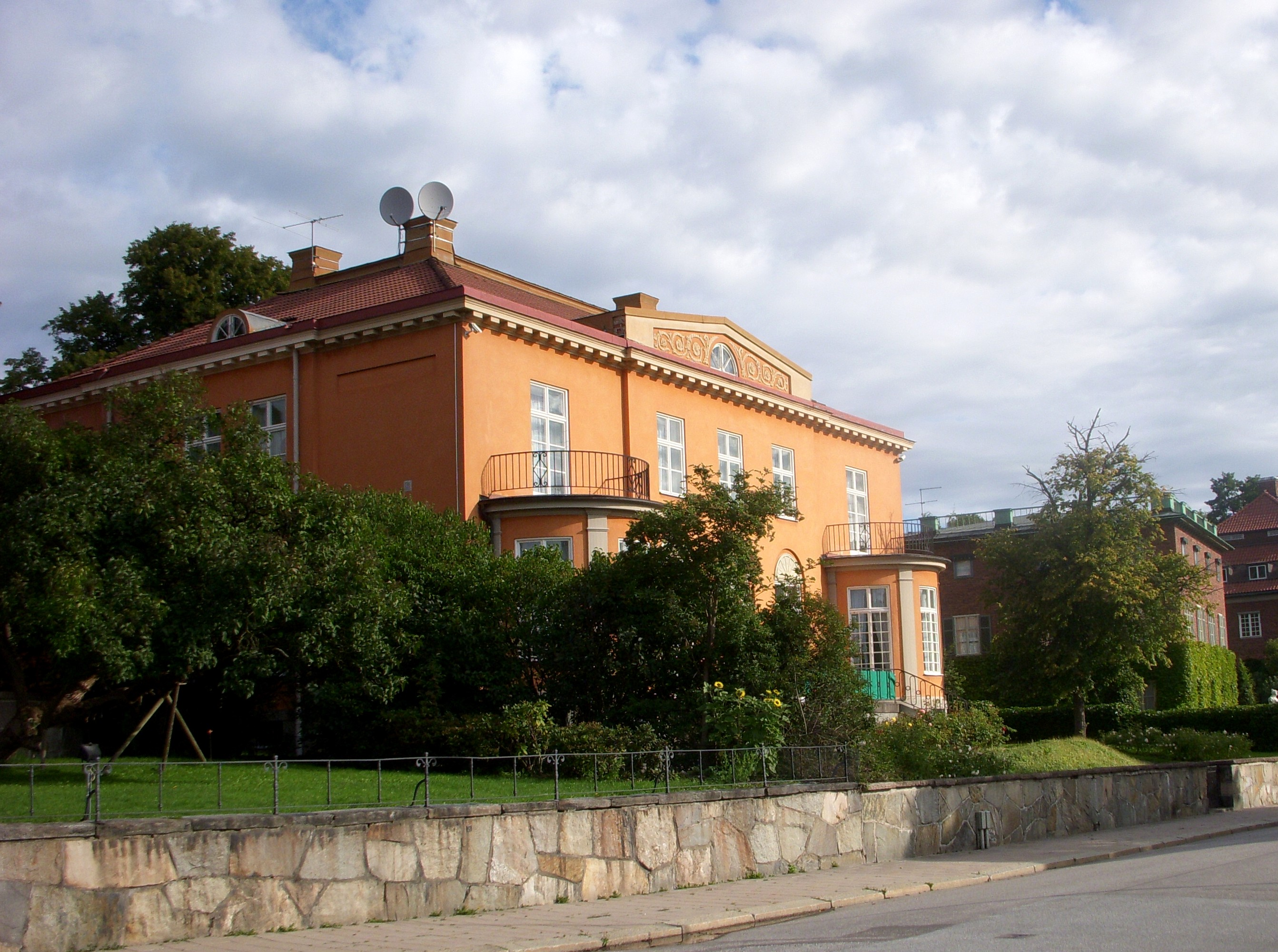 Diplomatstaden i Stockholm, Kv. Ambassadören nr. 2